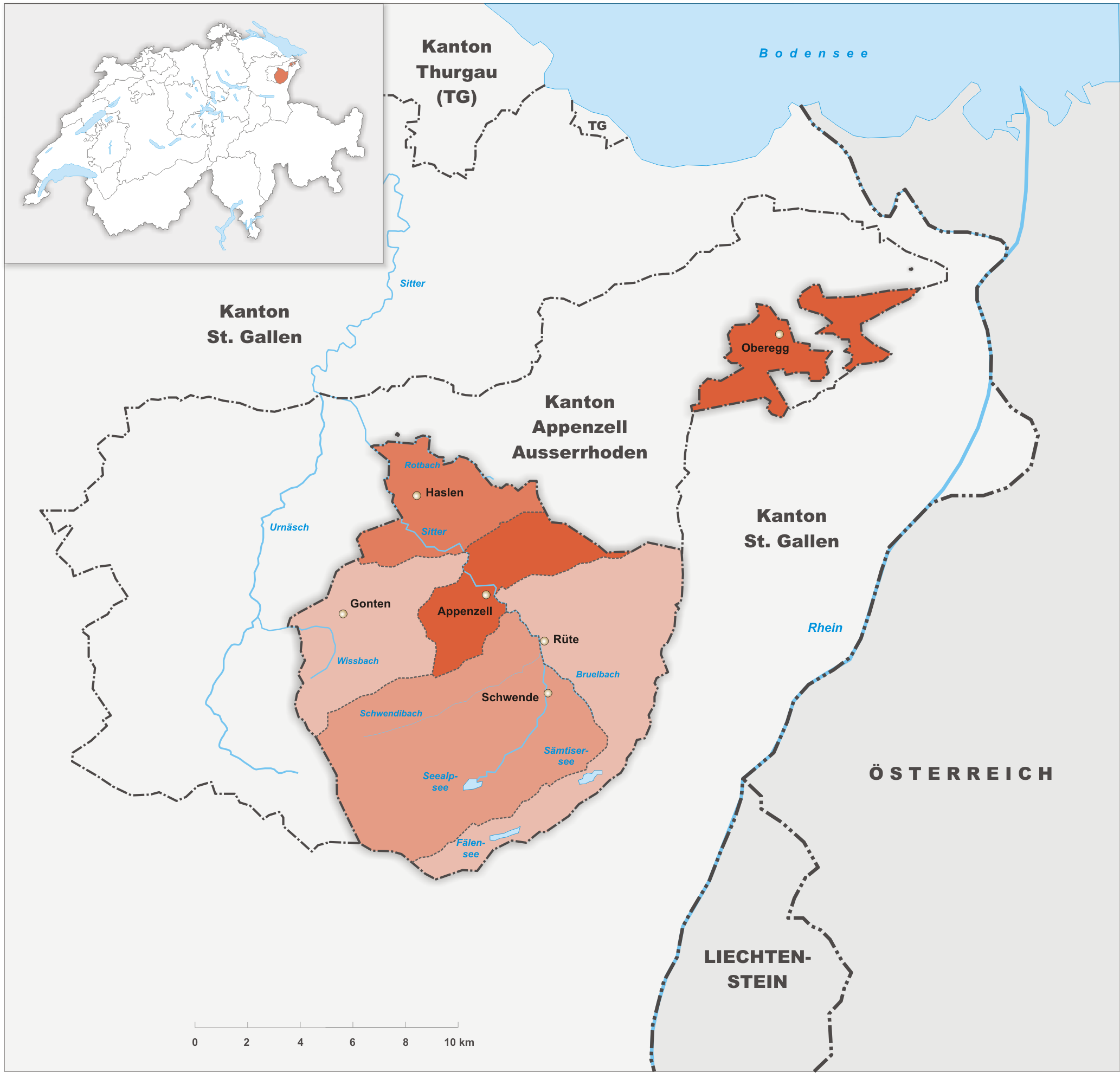 Bezirke des Kanton Appenzell Innerrhoden